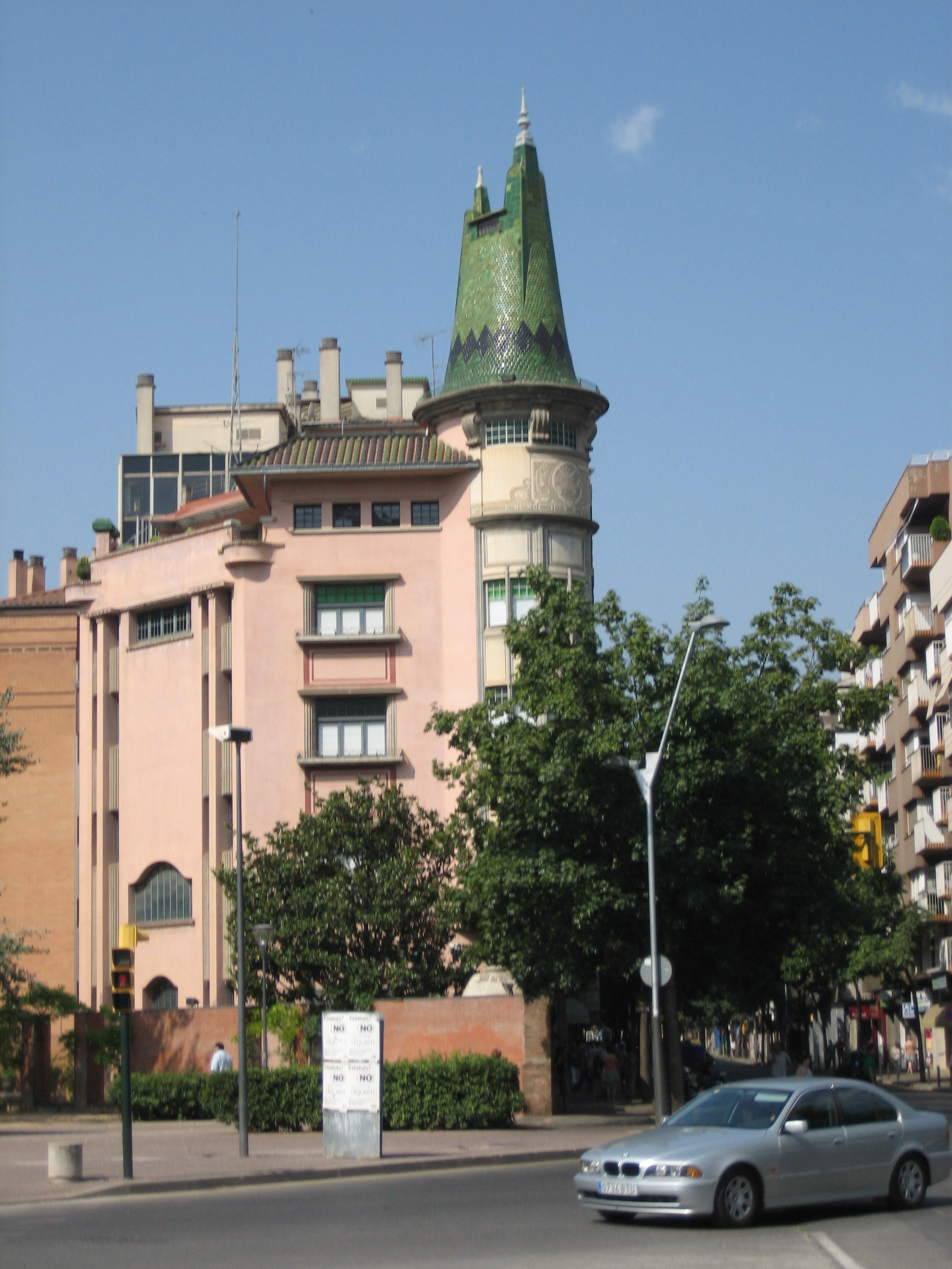 Casa de la Punxa de Girona. Arquitecte: Rafael Masó